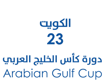 شعار كتابي لدورة كأس الخليج العربي لكرة القدم 2017